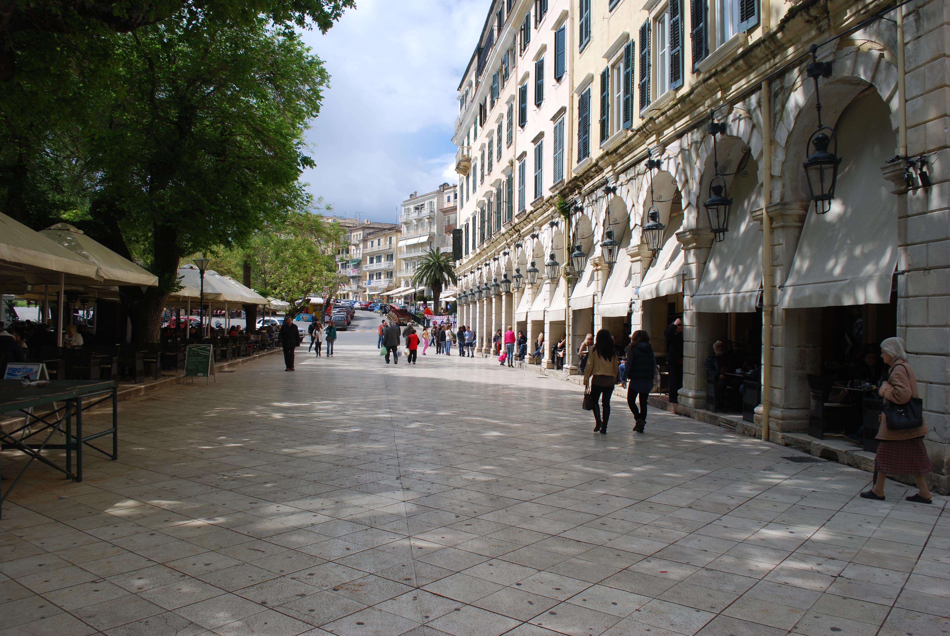 Vue de la vieille ville de Corfou.